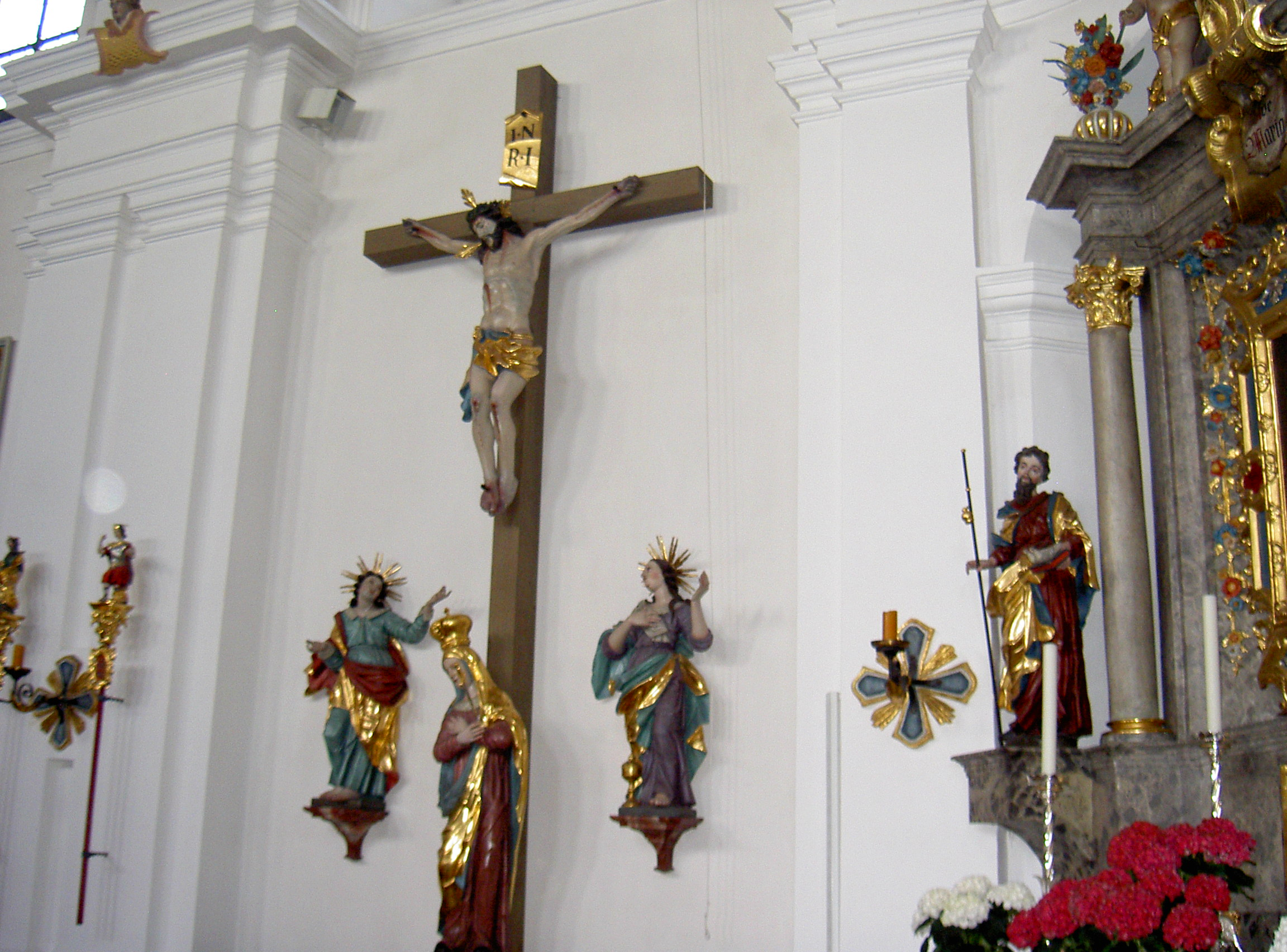 Innenausstattung von St. Georg in Neustadt an der Waldnaab